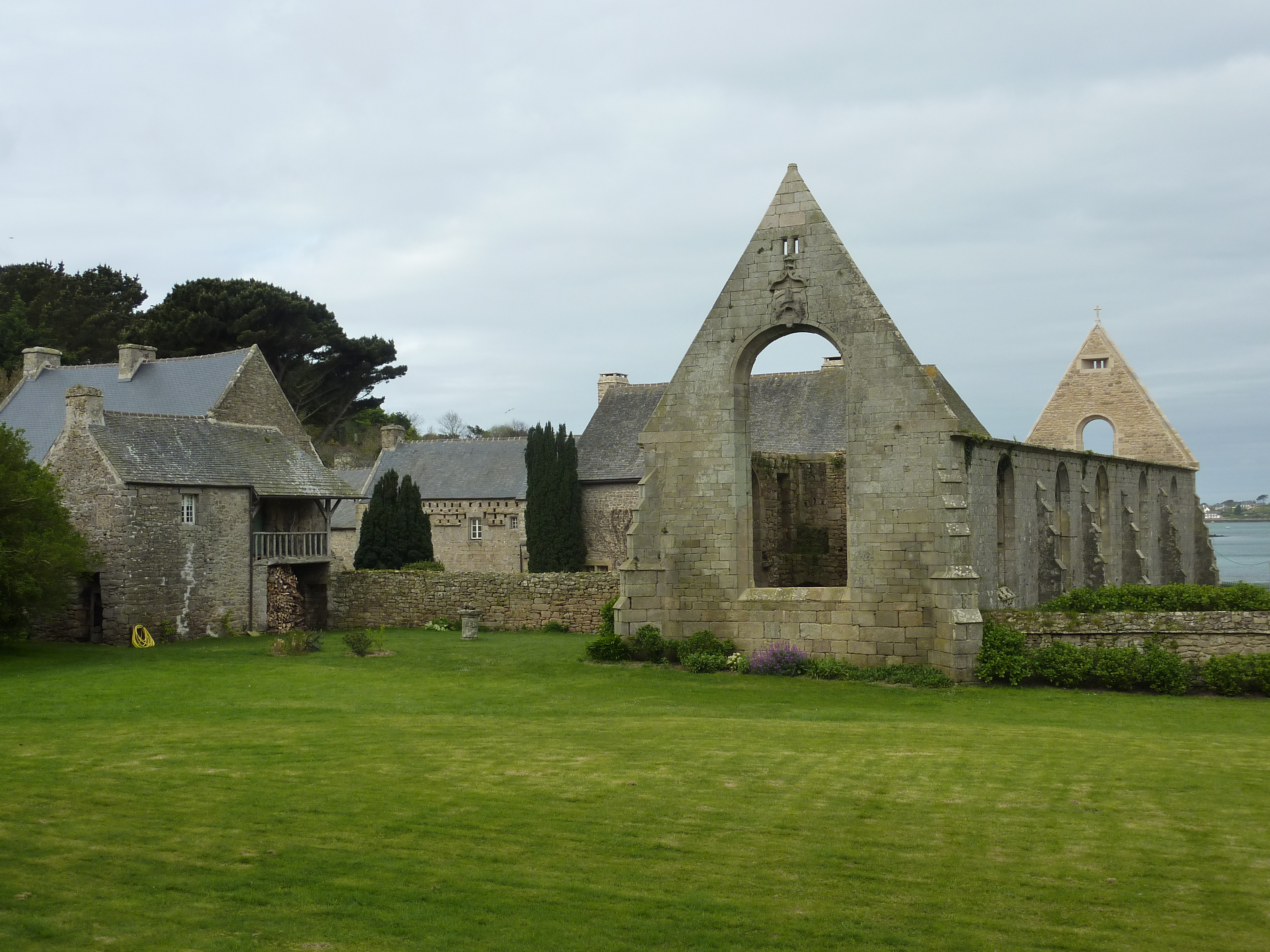 L'Aber-Wrach (Landéda) : abbaye Notre-Dame-des-Anges, vue générale